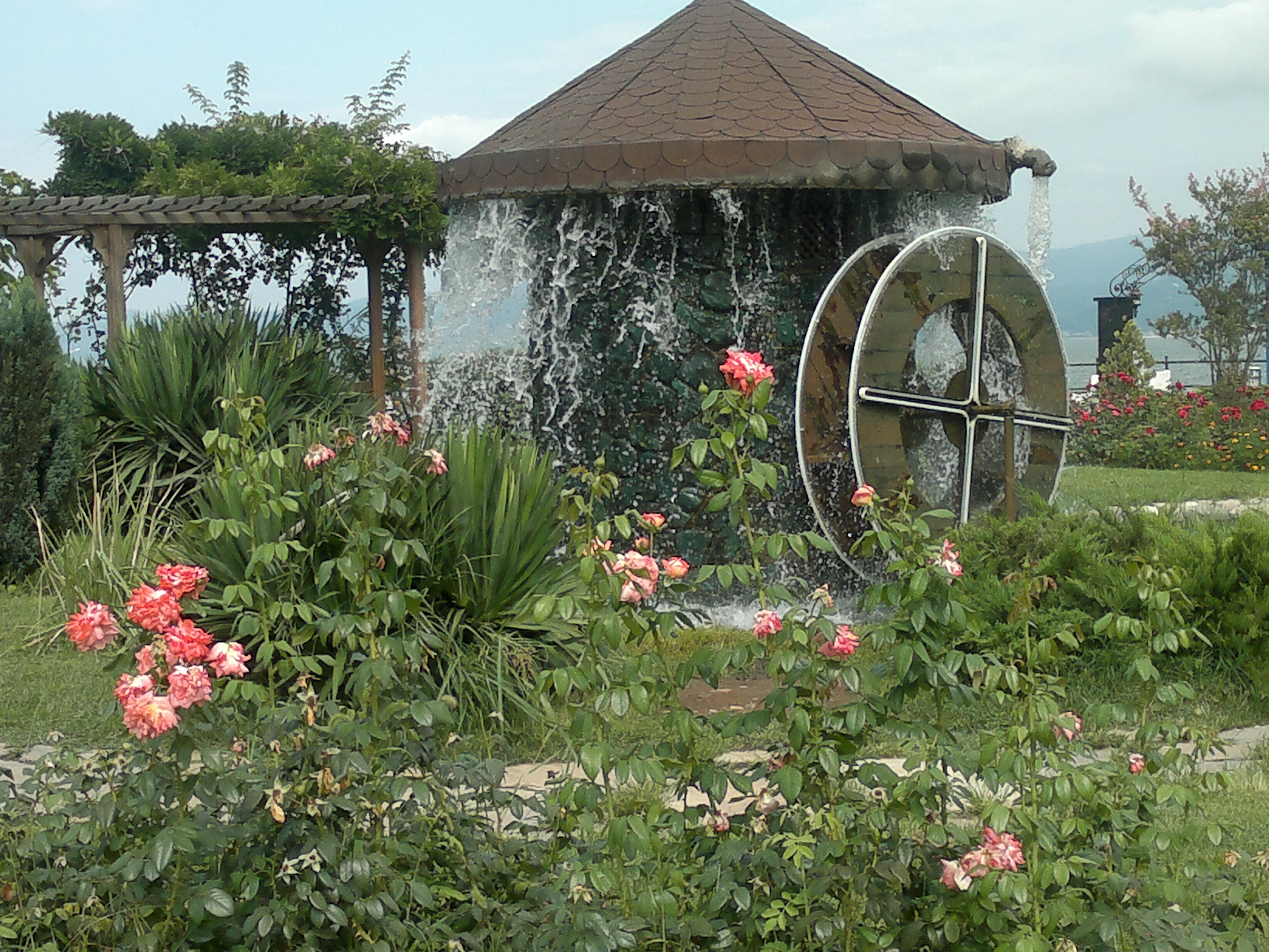 Fatsa sahil-Botnik park su değirmeni